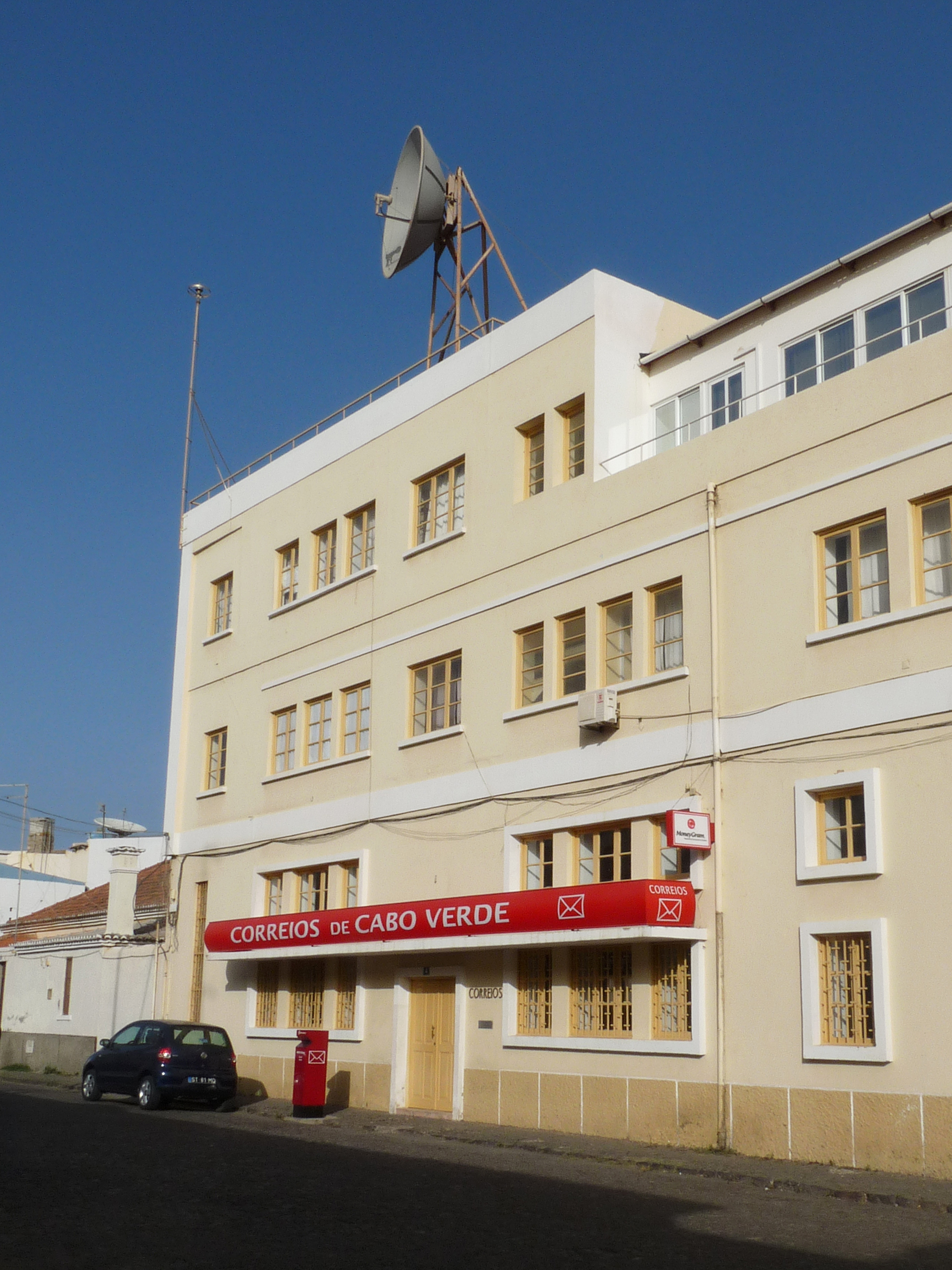 Praia (Cap-Vert) : siège central de la Poste